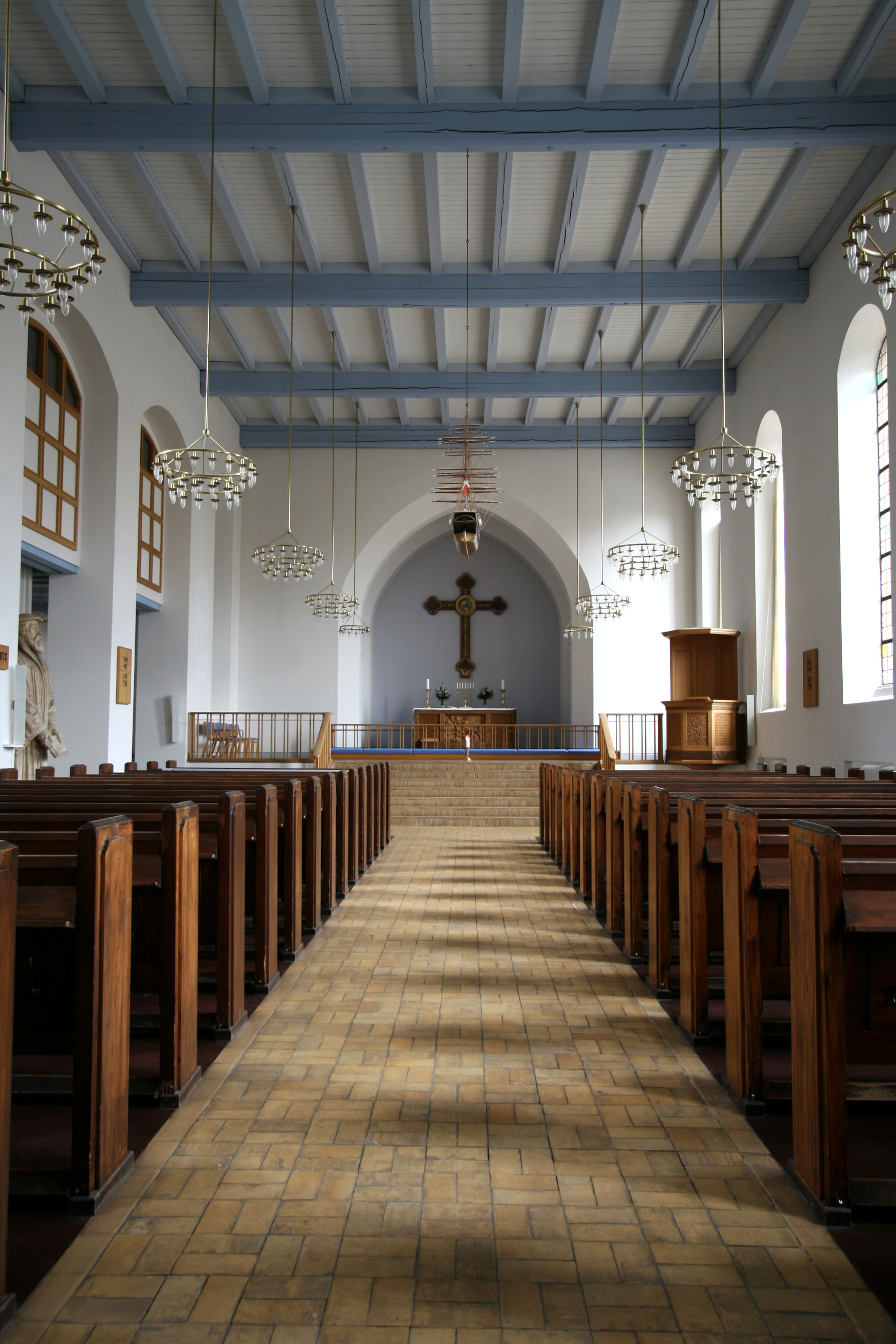 Hans Tausens Kirke, Amager, Copenhagen, Denmark. Interior. Portrait format.